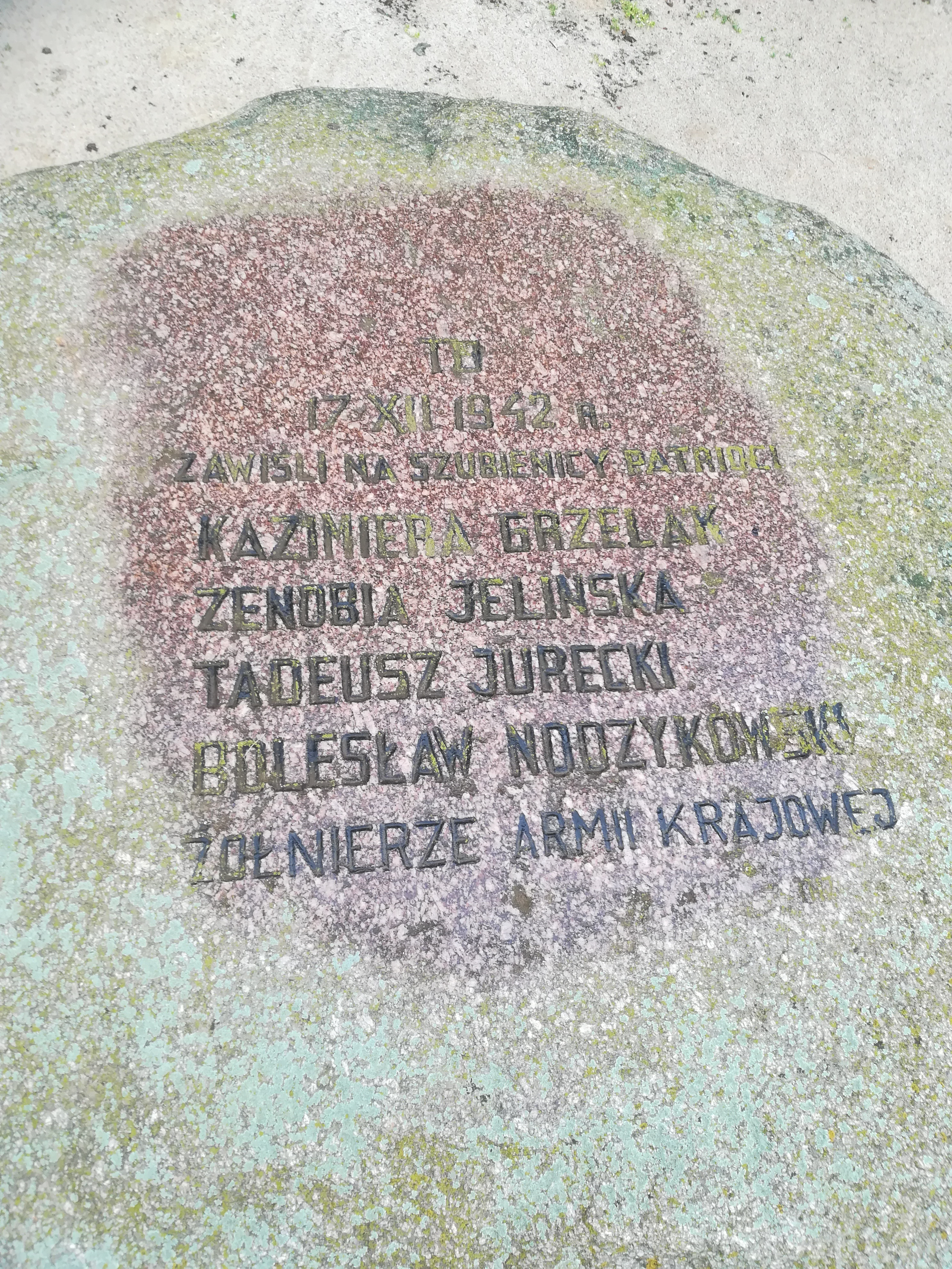 Pomnik żołnierzy Armii Krajowej zamordowanych przez Niemców - Zamek w Ciechanowie.